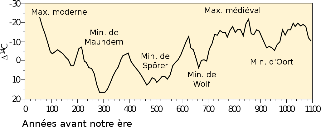 Activité_solaire_ depuis_1100ans